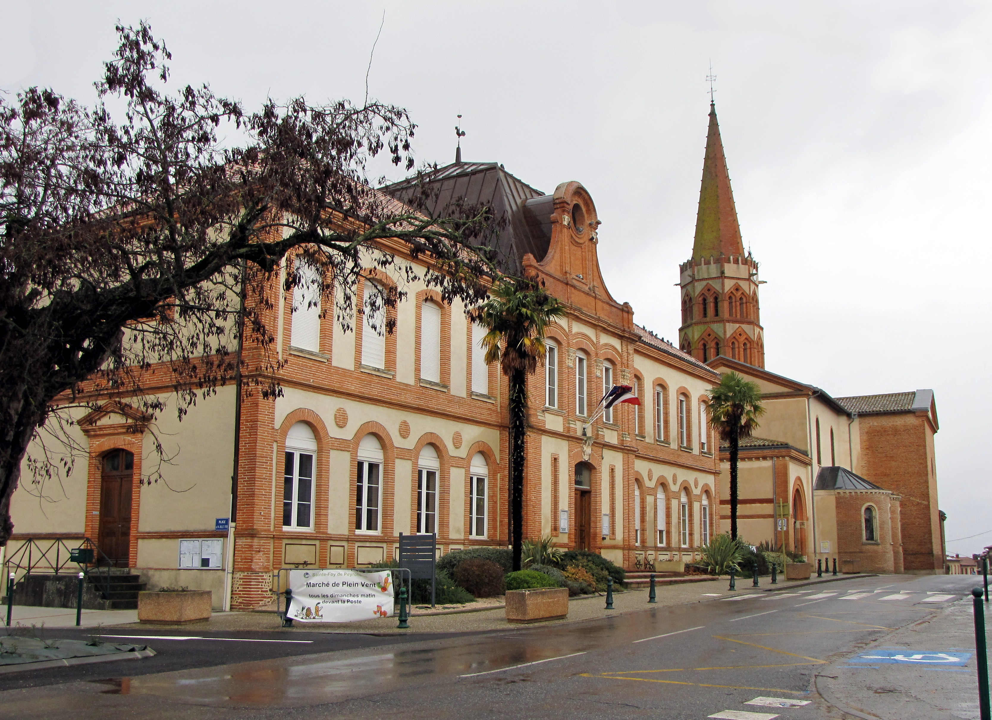 Sainte-Foy-de-Peyrolières